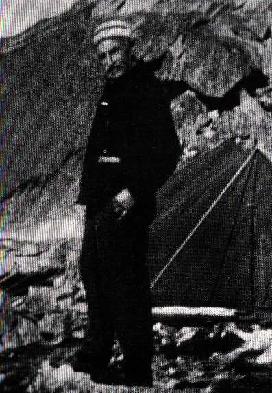 Joseph Ravanel (1869-1931)